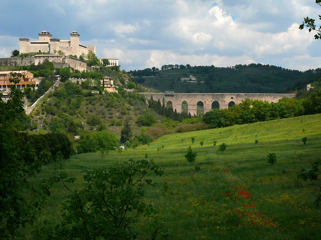 Spoleto: Albornozian Castle and Ponte delle Torri